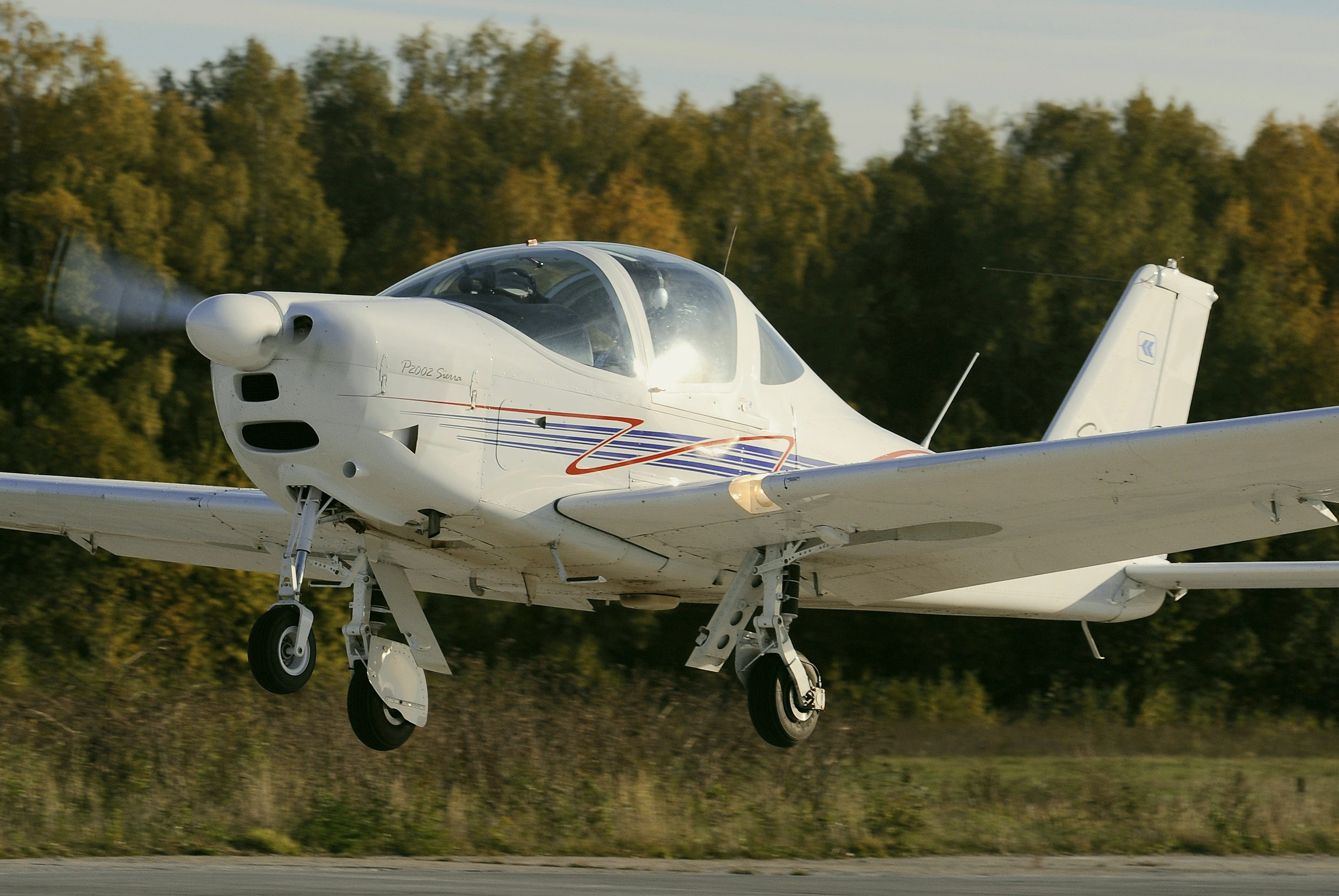 Tecnam P2002 SierraRG RA-1303g